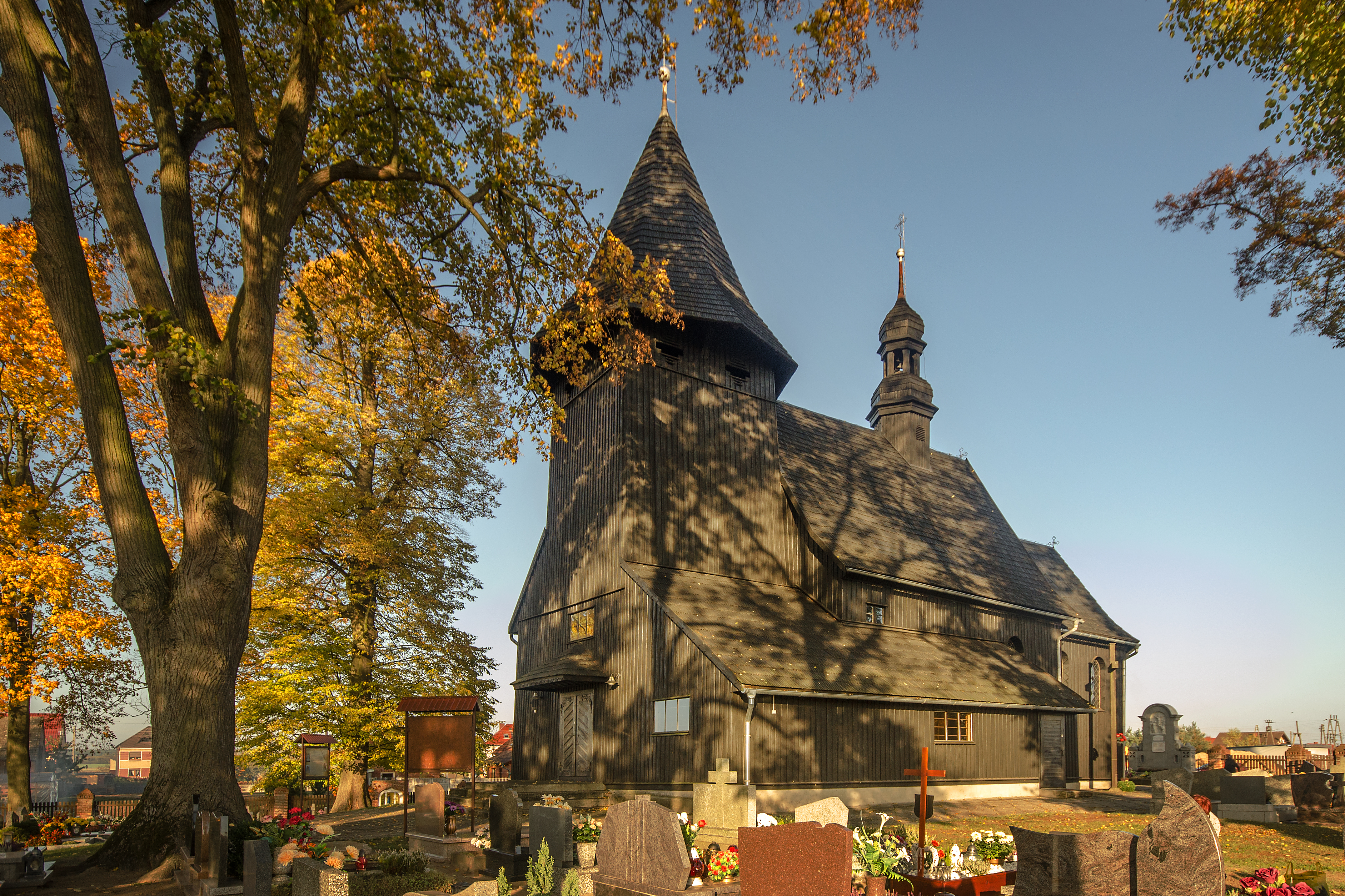 Laskowice, kościół fil. p.w. św. Wawrzyńca, 1689, 1856